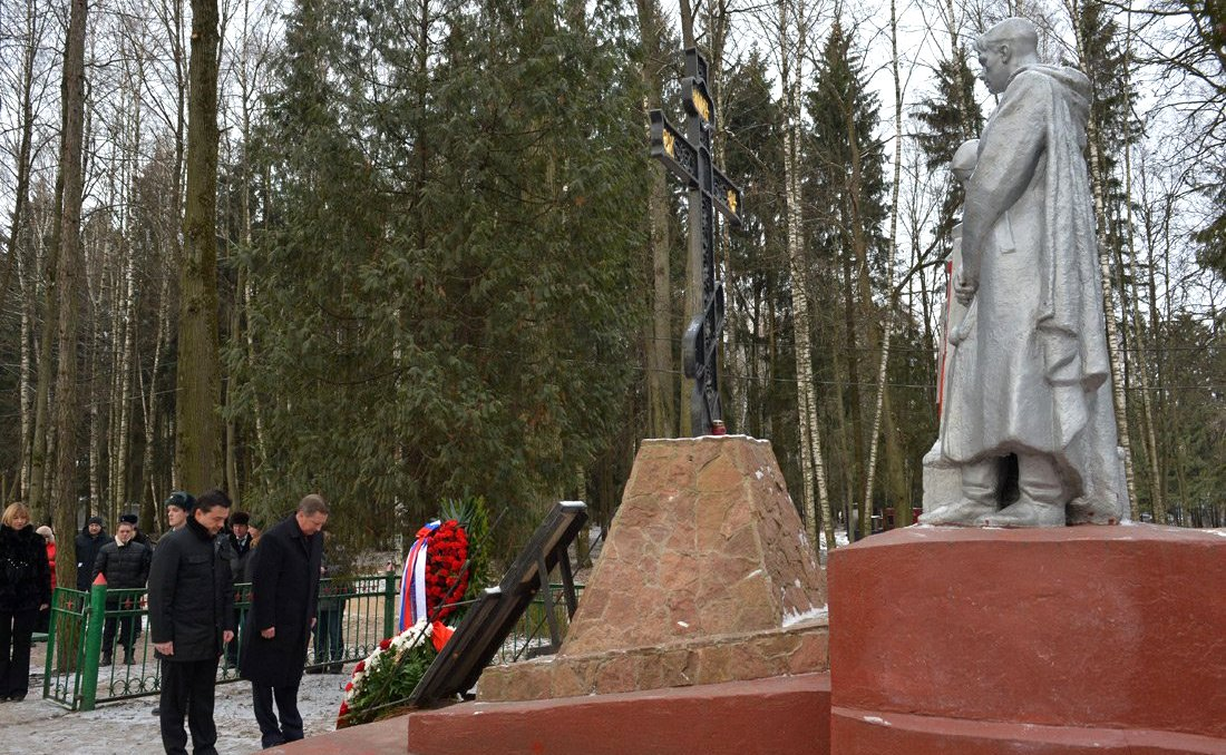 Возложение цветов к братской могиле советских воинов в посёлке Красный Московской области. Глава Администрации Президента России Сергей Иванов и губернатор Московской области Андрей Воробьёв.